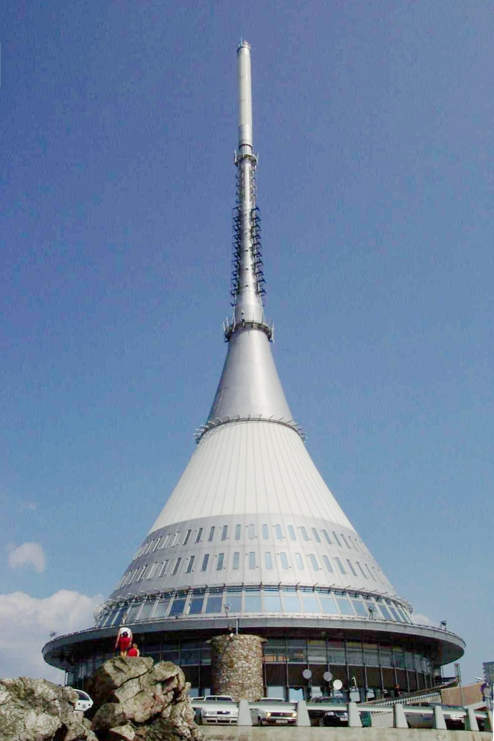 Ještěd Transmitter - Ještědský vysílač